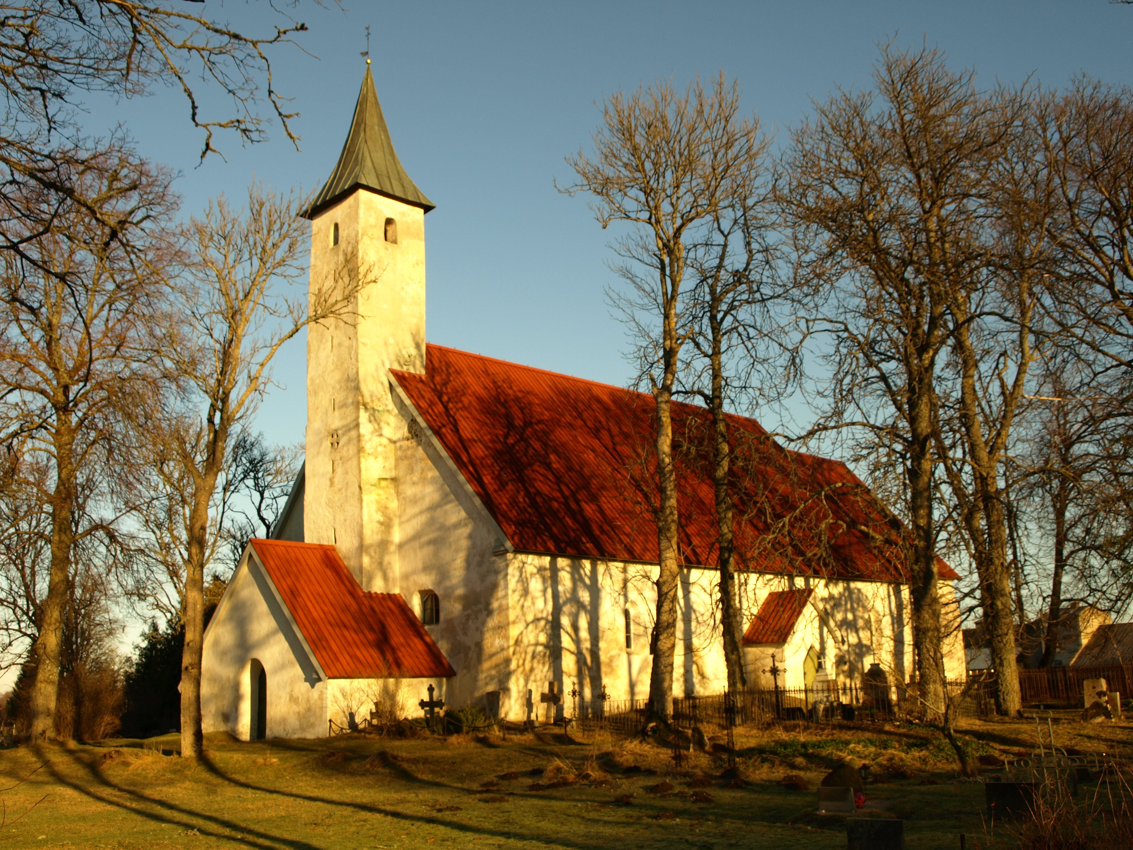 Noarootsi kirik